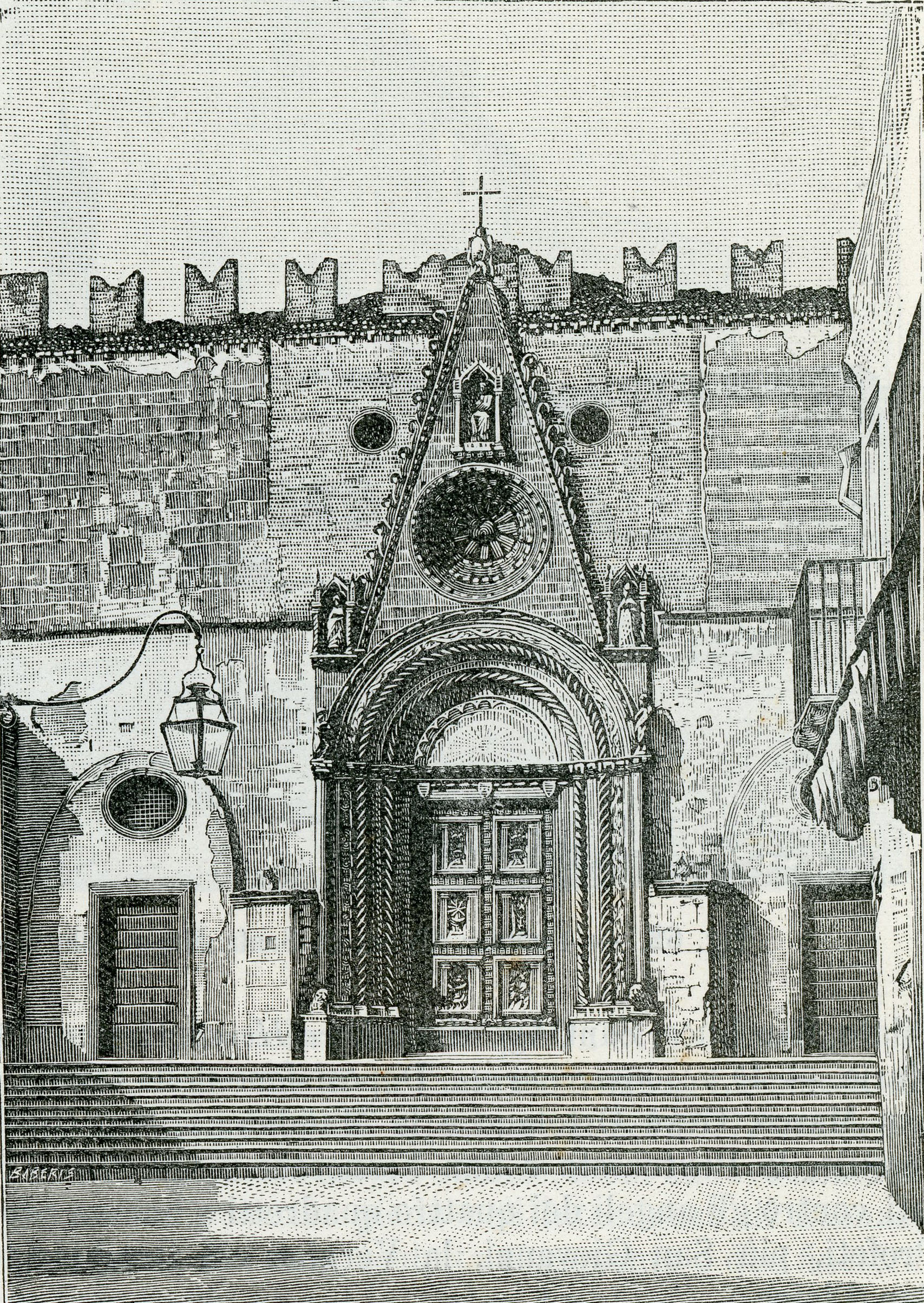 Teramo: porta maggiore della cattedrale (xilografia di Barberis 1898).